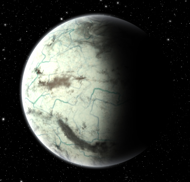 Posible aspecto de Kapteyn b